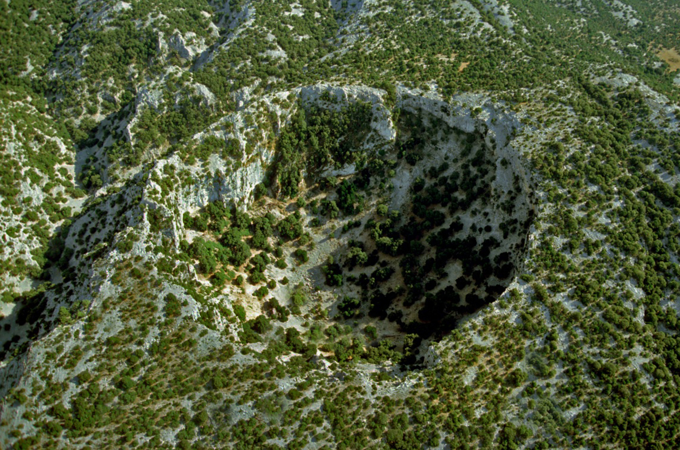 La dolina di Su Suercone tra il Supramonte di Orgosolo (NU) e Dorgali (NU)